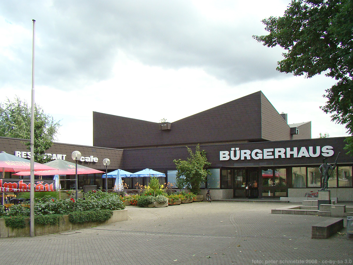 Bürgerhaus in Heilbronn-Böckingen: 1975 wurde in Böckingen das Bürgerhaus nach Entwürfen der Architektengemeinschaft Braun, Keppler, Stieglitz mit Saal, Gaststätte, Tagungsräumen und Stadtbüchereifiliale eröffnet.( Werner Föll, Chronik der Stadt Heilbronn. Band X: 1970–1974 , Heilbronn 1999, [Einleitung ab XXXVI].)